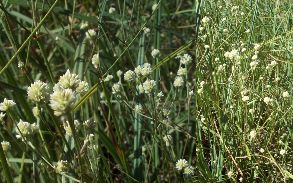 Pfaffia glomerata. Amaranthaceae. Fotos tomadas en bañado cercano a la balsa al margen del Río Negro en Palmar, departamento de Soriano, Uruguay.